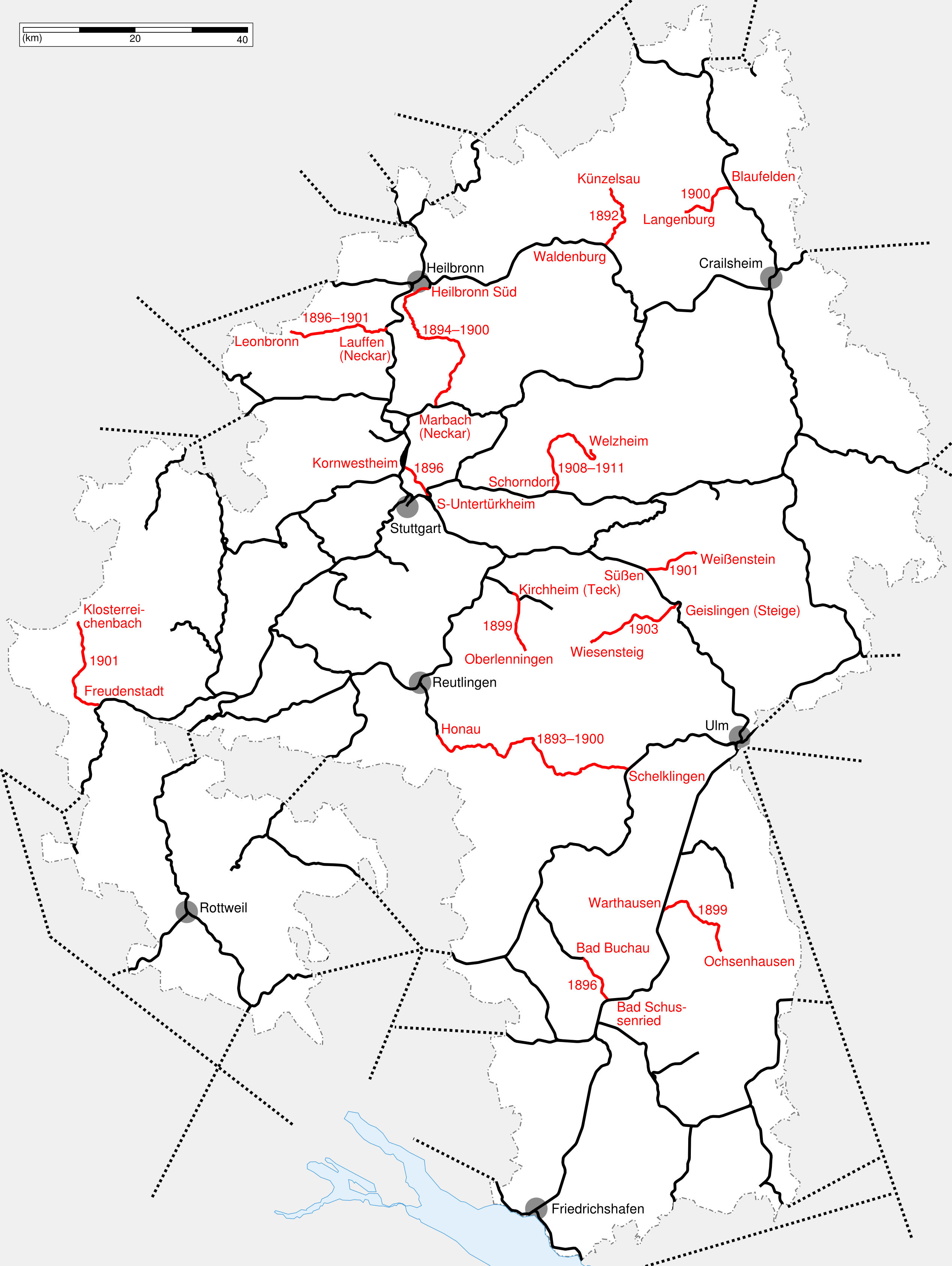 Karte des Streckennetzes der Königlich Württembergischen Staatseisenbahnen, Stand 1920. Rot markiert: Eröffnungsabschnitte mit Einheitsbahnhöfen.